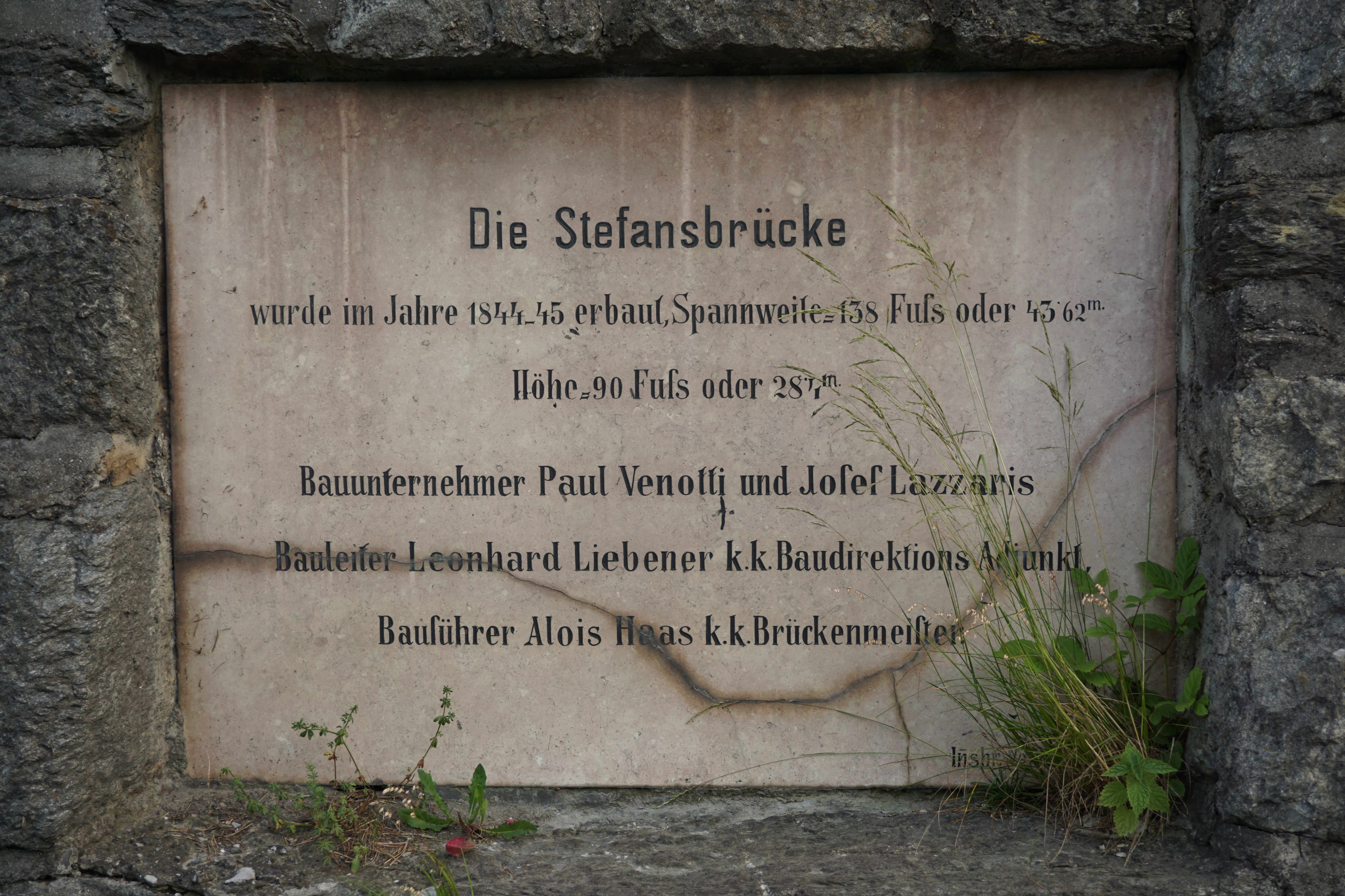 Geschichtstafel an der Brennerstraße über den Bau der Stefansbrücke